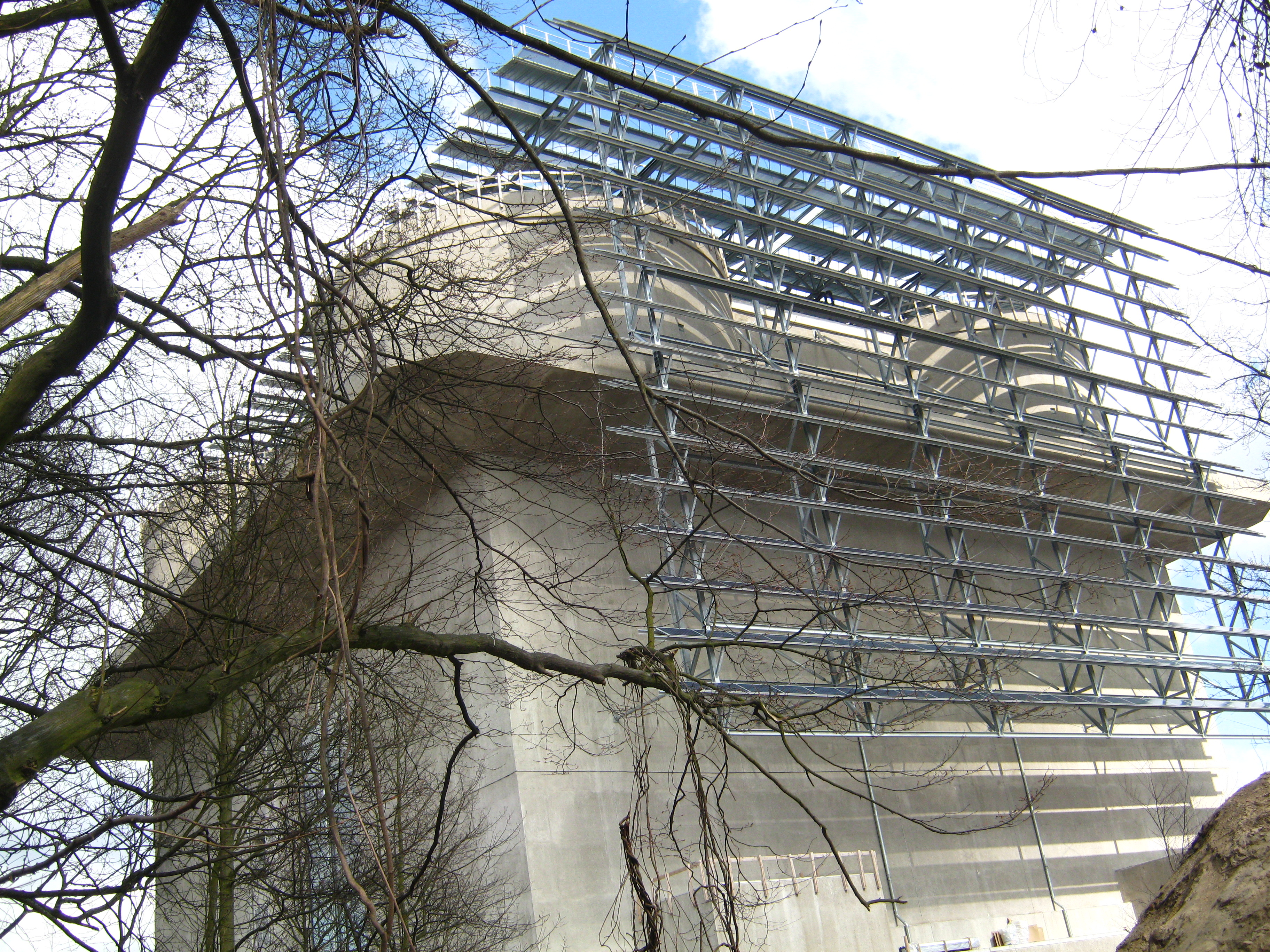 Energiebunker der Internationalen Bauausstellung Hamburg 2013 mit Sonnenkollektoren und Terrasse. Der im Jahre 1943 erbaute Flakbunker war im Rahmen der Ausstellung zum Energiebunker mit Aussichtssmöglichkeit und Café wieder geöffnet worden und Befindet sich in Wilhelmsburg, einem Stadtteil von Hamburg.